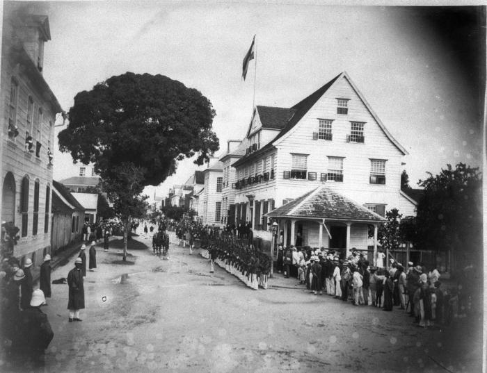 Foto. Drukte op straat in Paramaribo in verband met de opening van de zitting van de Koloniale Staten.